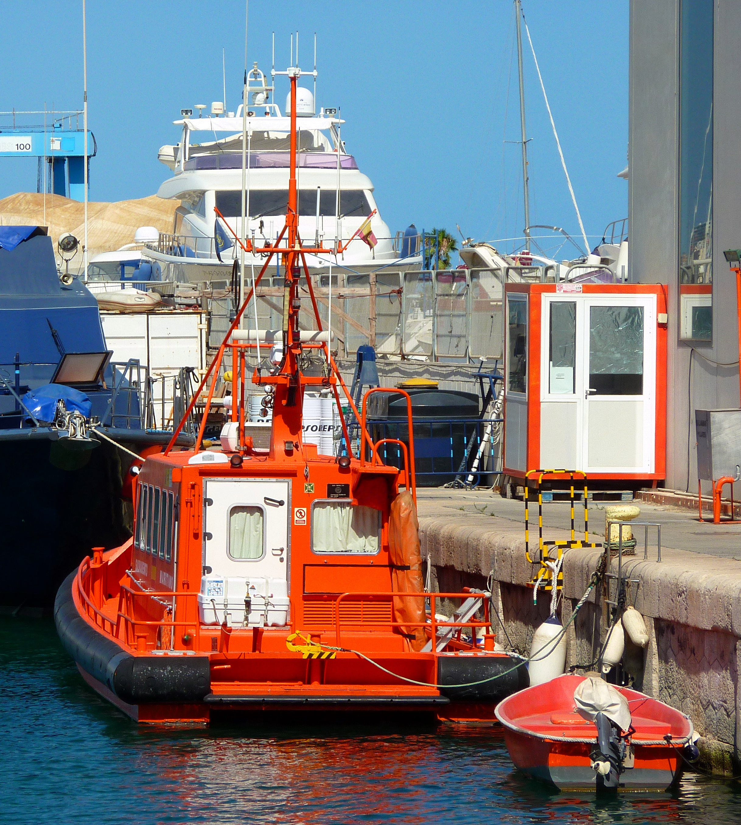 Embarcación de la Sociedad de Salvamento y Seguridad Marítima "Salvamar Polaris".